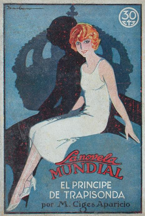 El principe de trapisonda imagen